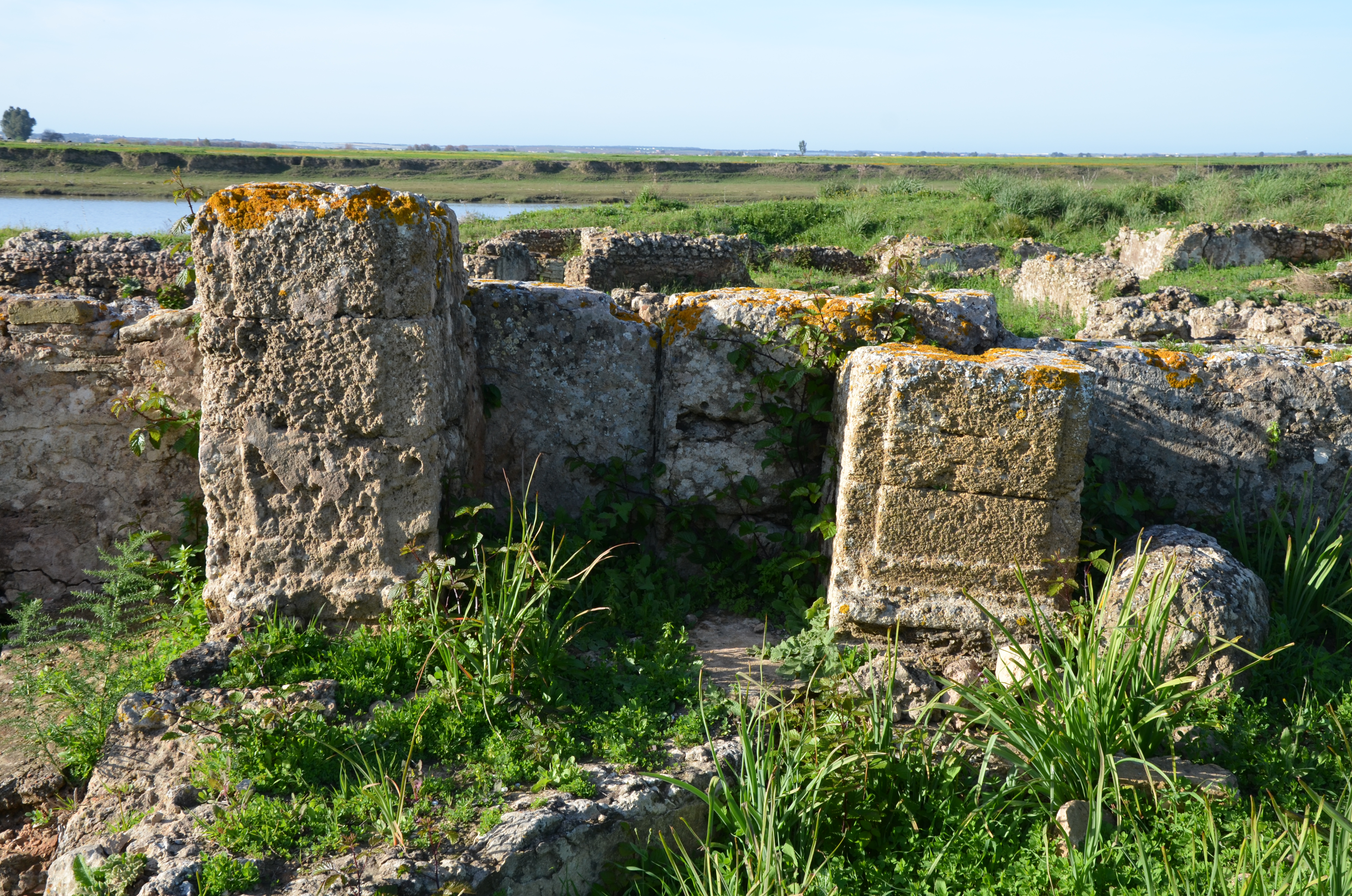 Thamusida, Mauretania Tingitana, Morocco